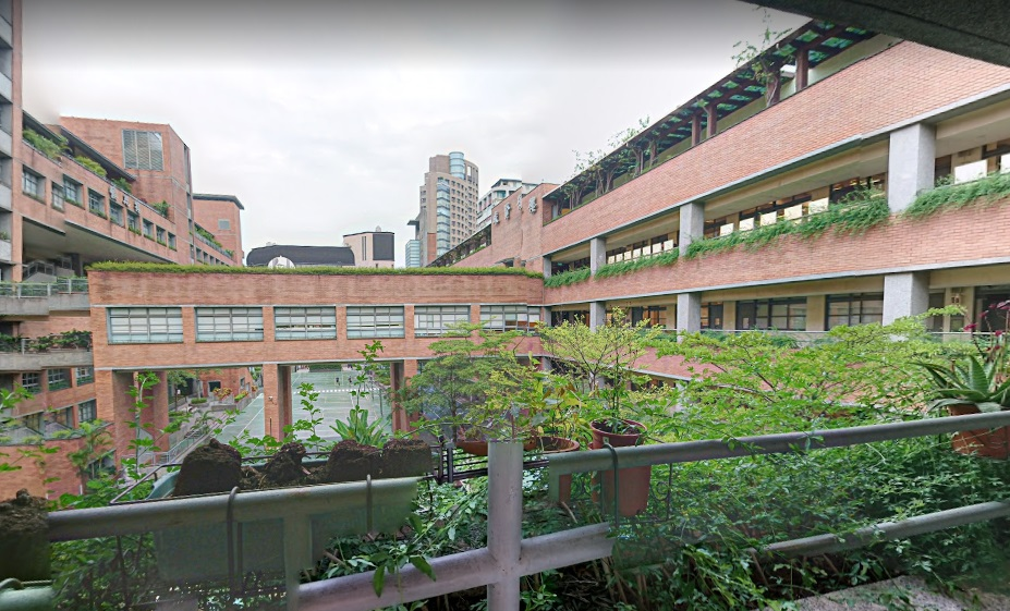 附設國中部